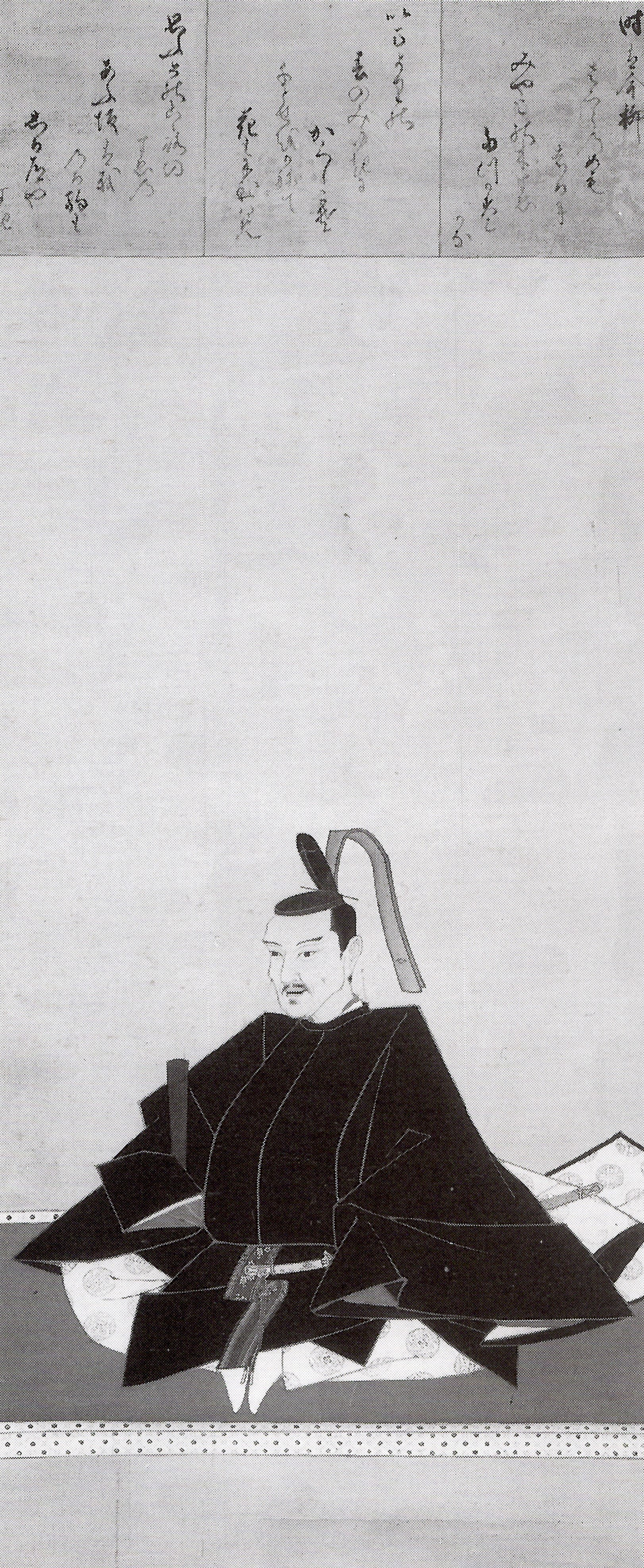 中院通純の肖像。